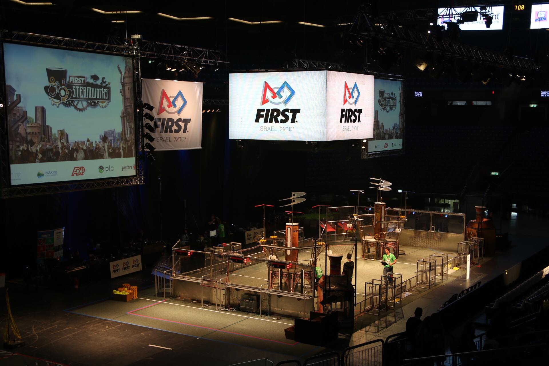 A photo from the FIRST Robotics Competition Israel District Championship hosted in Menora Mivtachim Arena, Tel Aviv, Israel. Field side view.